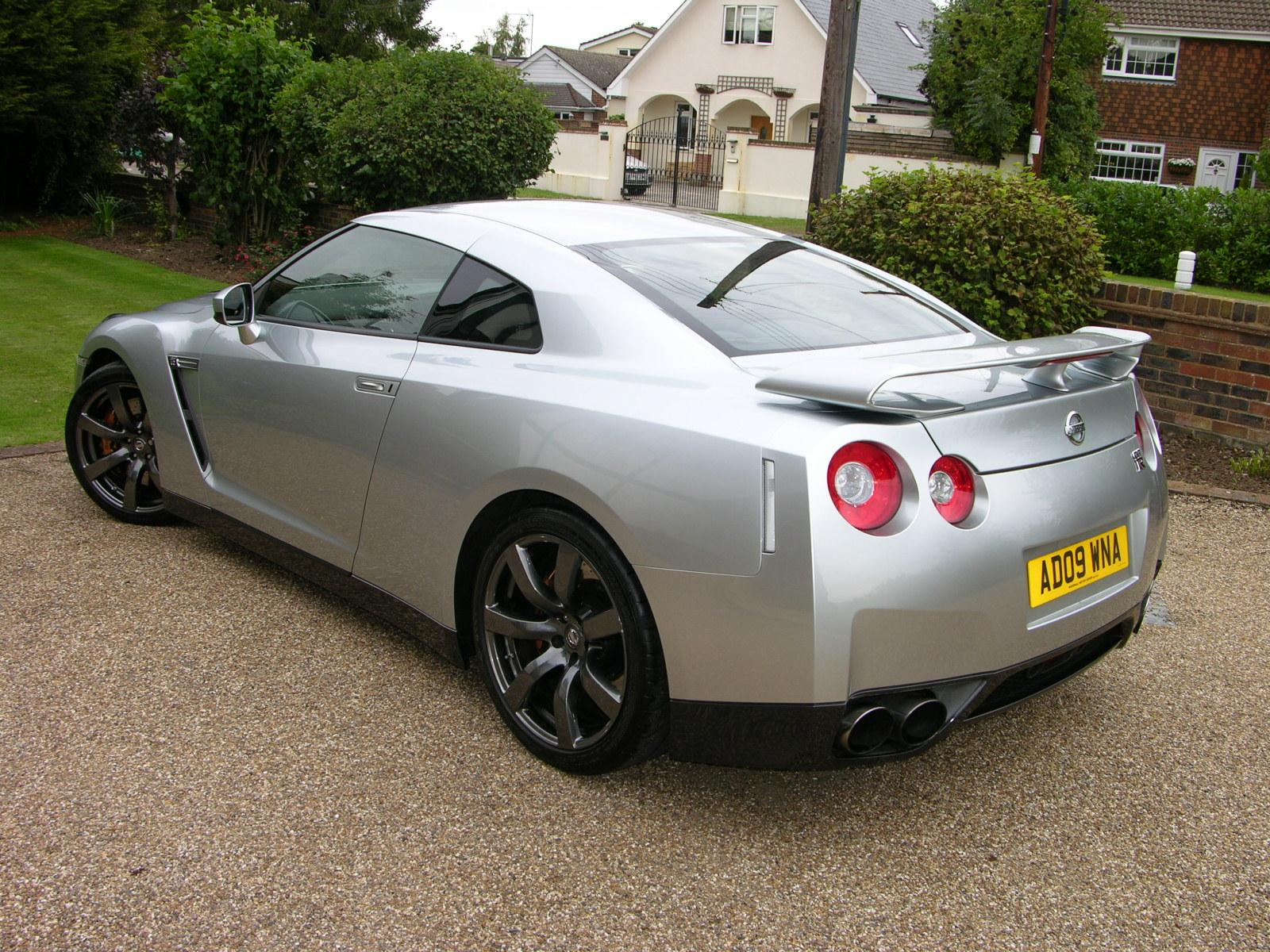 2009 Nissan GT-R Premium